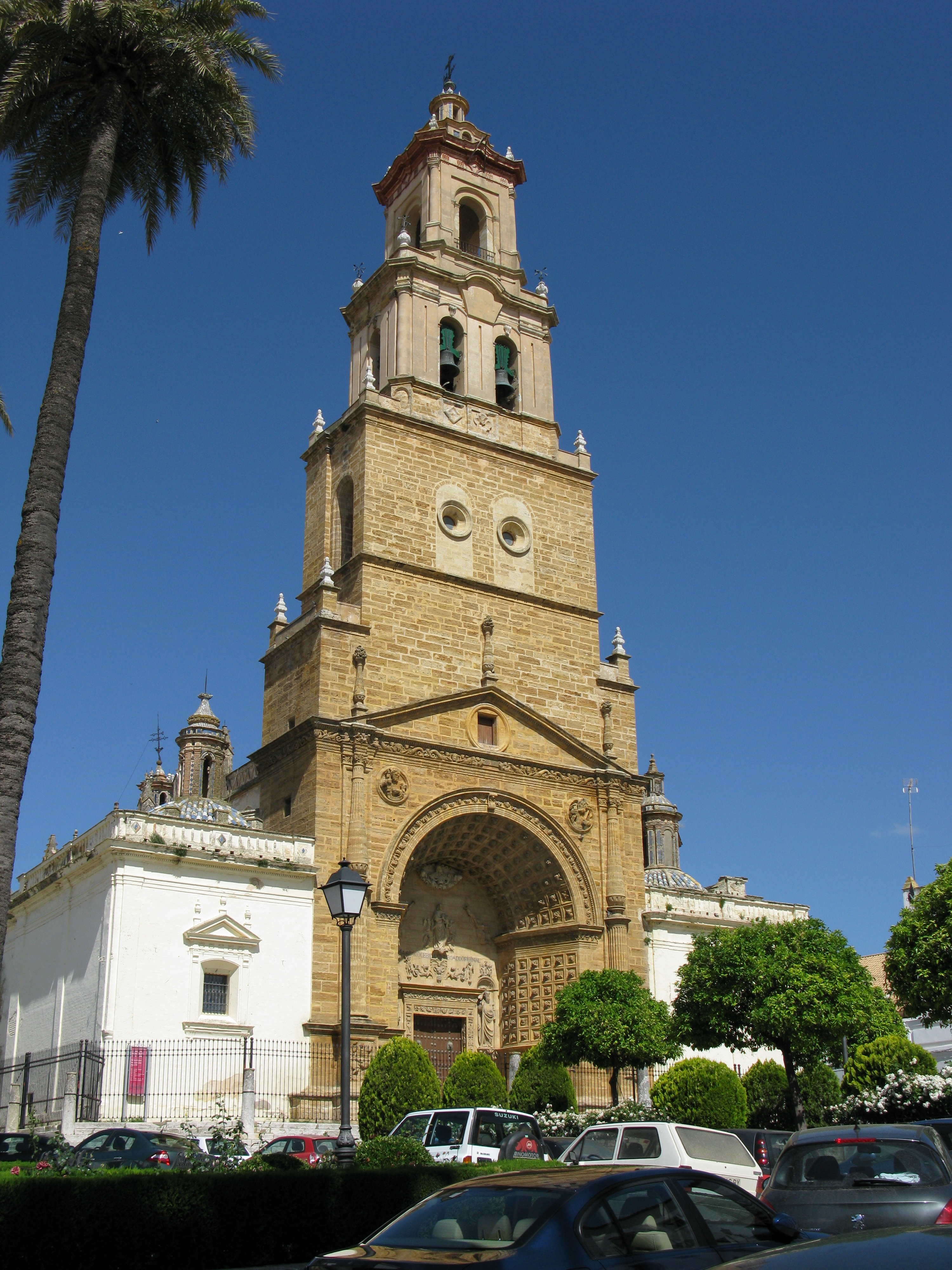 Iglesia de Santa María de la Mesa, en Utrera (Sevilla), España.